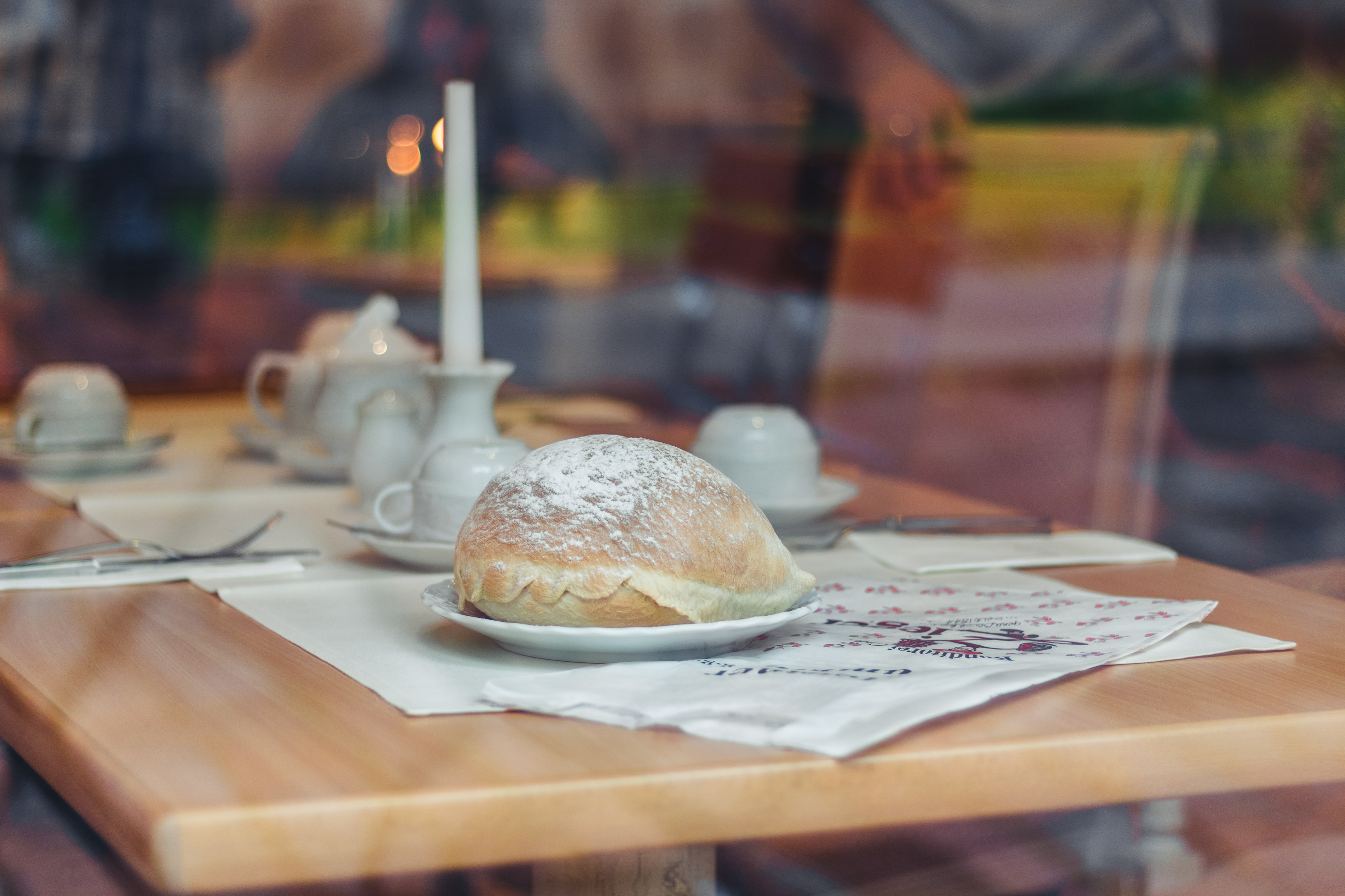 Meißner Fummel